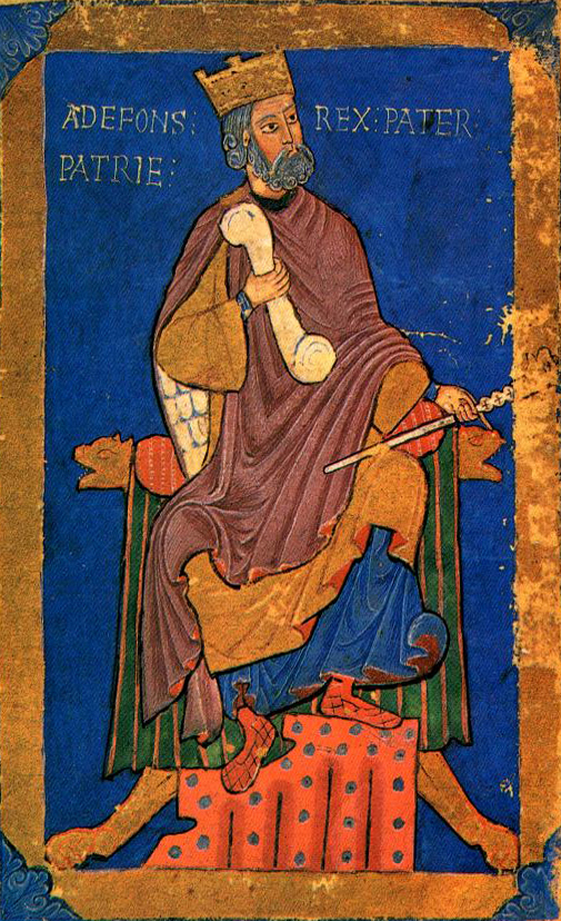 Afonso VI, rei de Galiza ou de toda Galiza ―Galiza, León e Castela― (1072-1109) e de Toledo (1085-1109).